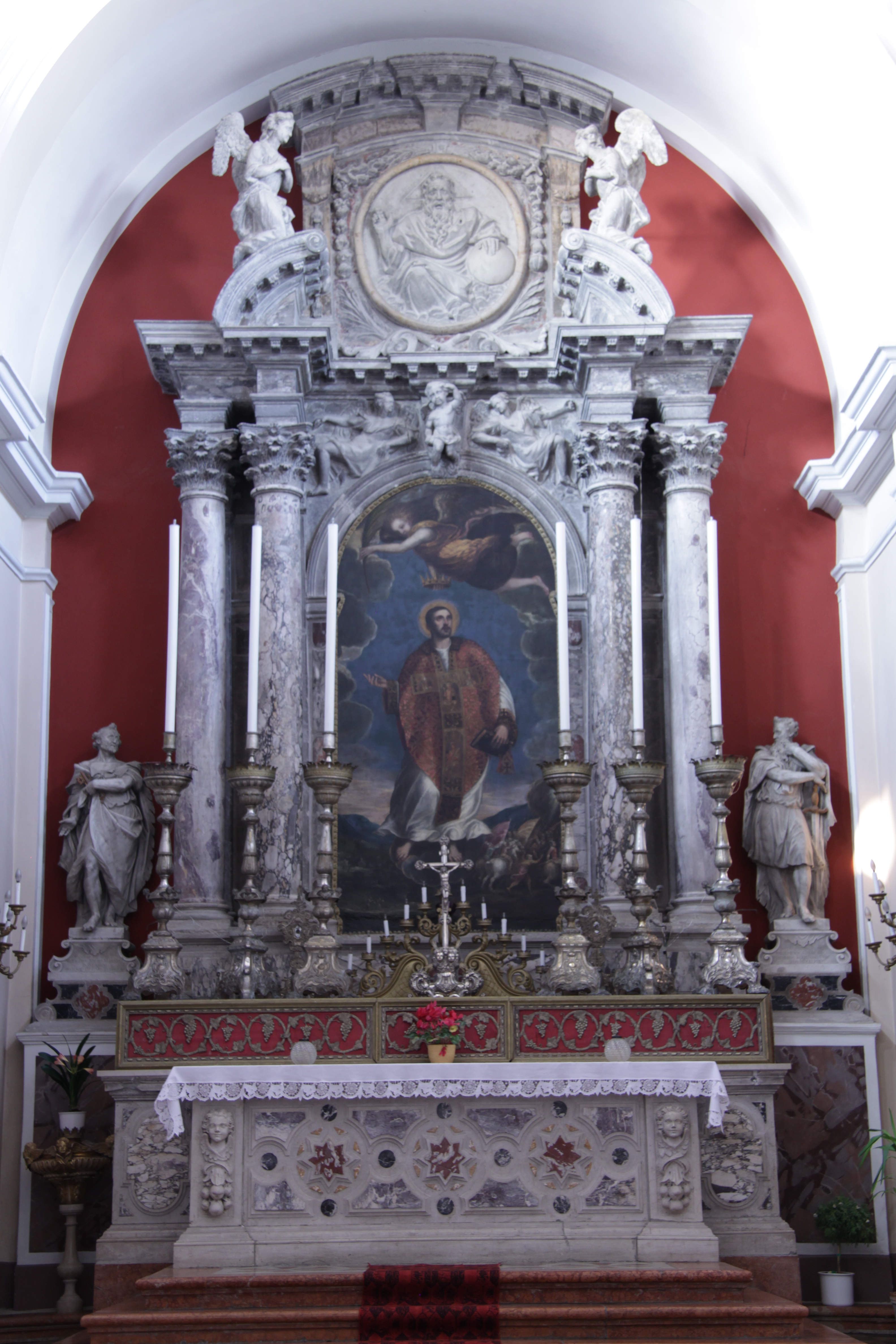 Glavni oltar Sv.Mavra